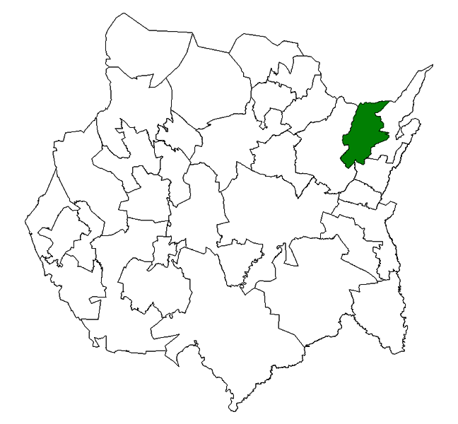 Mapa de ubicación del municipio de Ocuituco